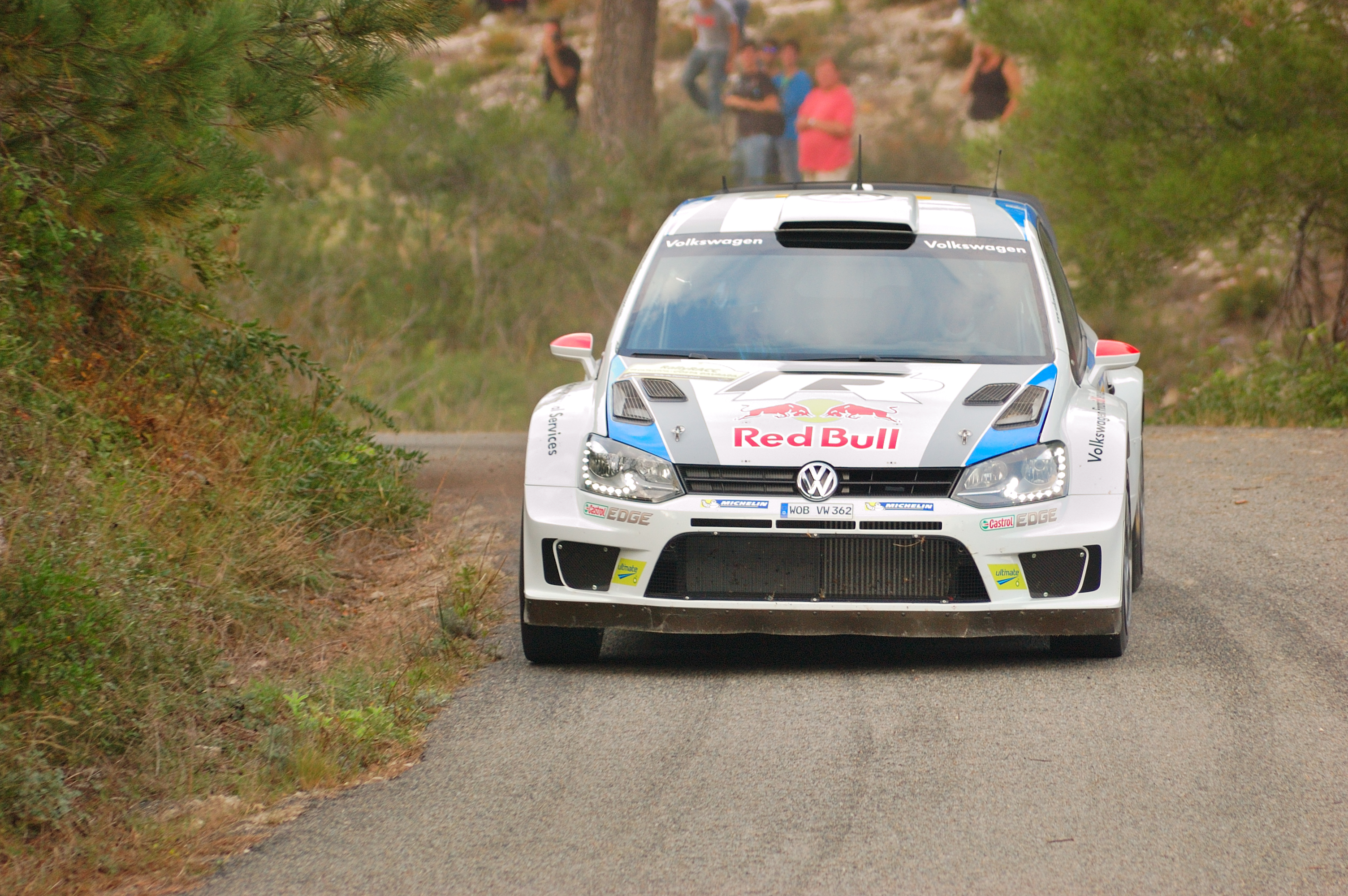 S.Ogier/J.Ingrassia SS7 Colldejou - Rally Catalunya 2013